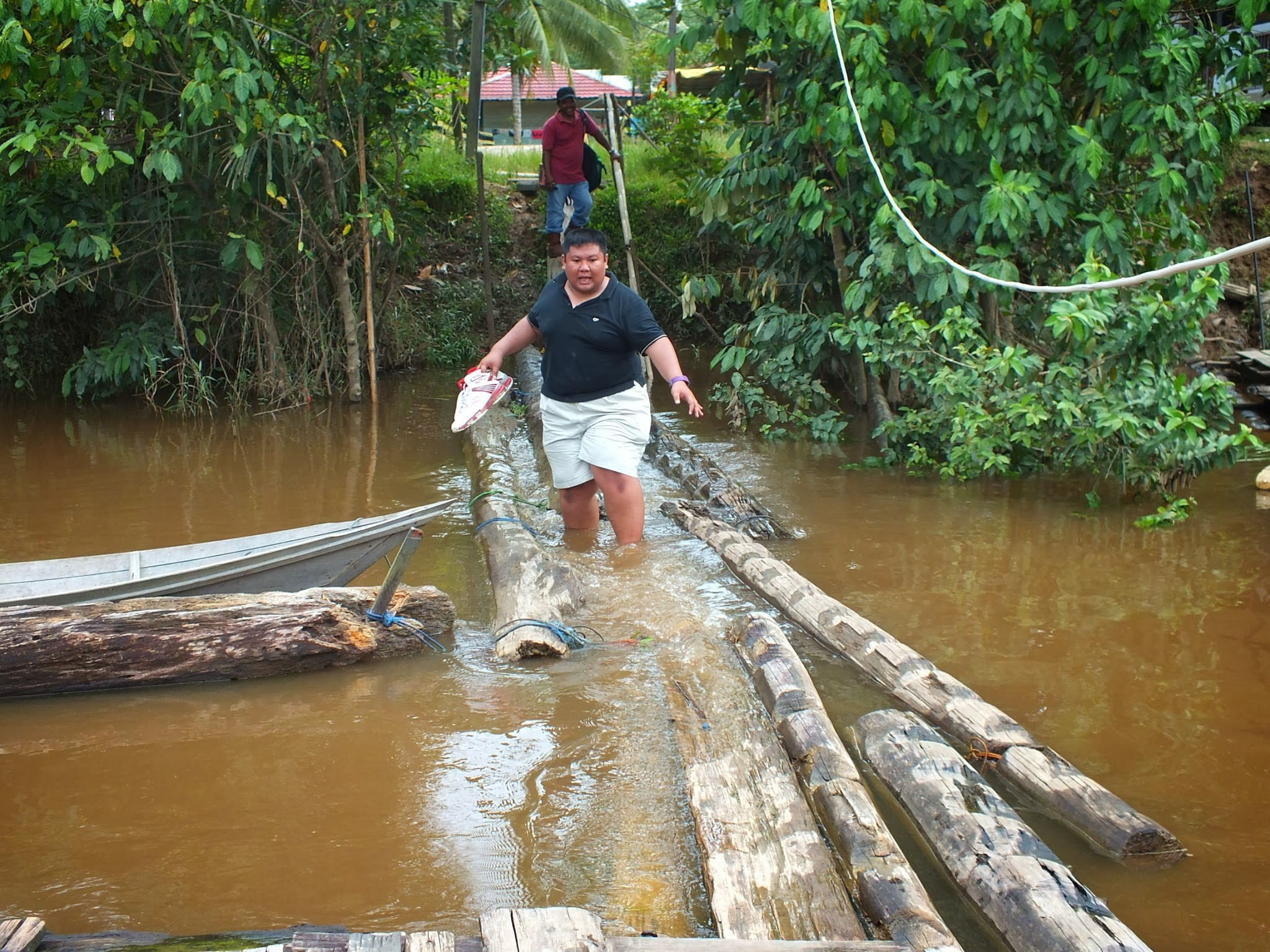 erwin n his problem